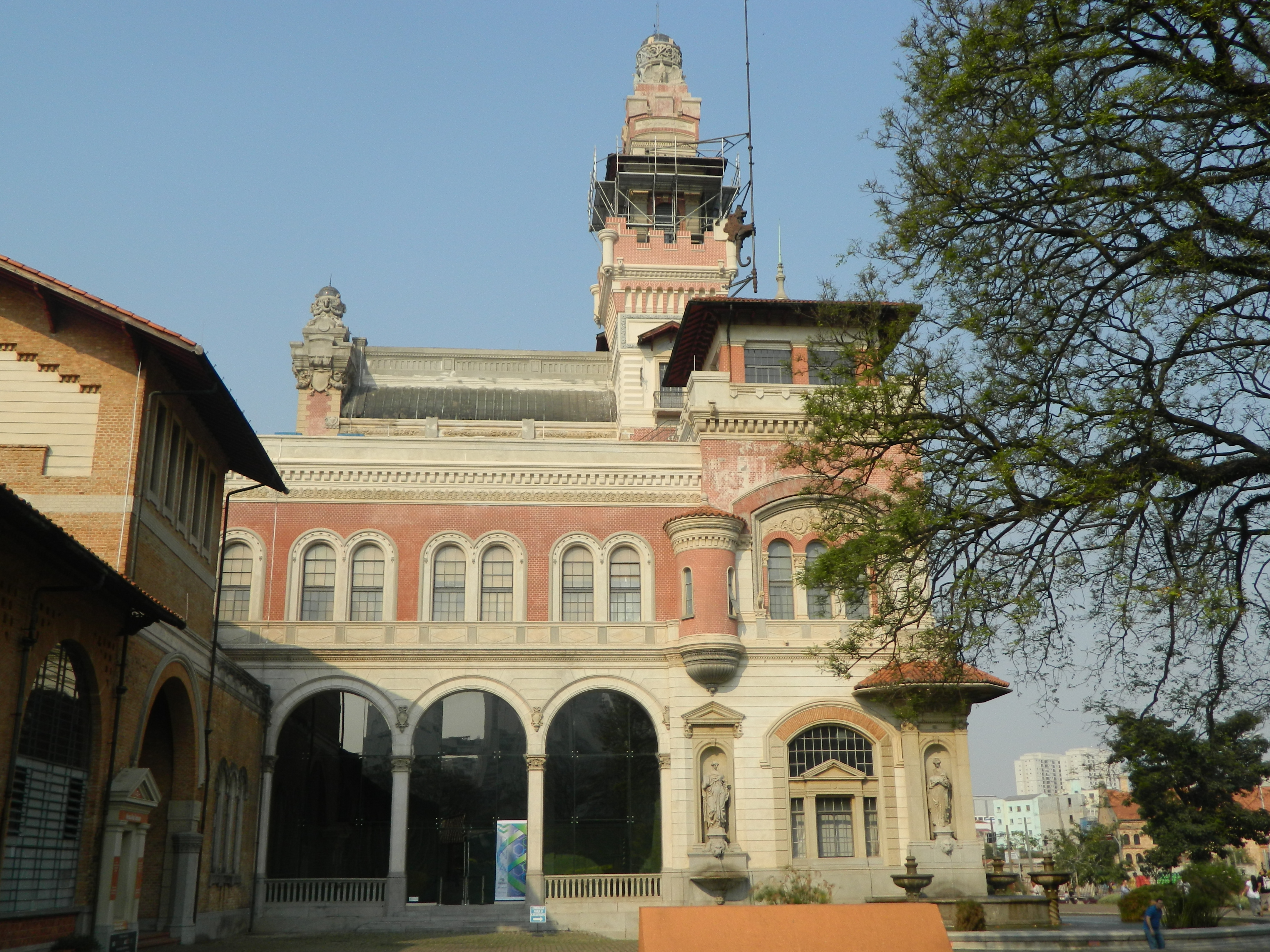 Uma das fachadas laterais externas do Palácio das Indústrias em São Paulo (SP), Brasil